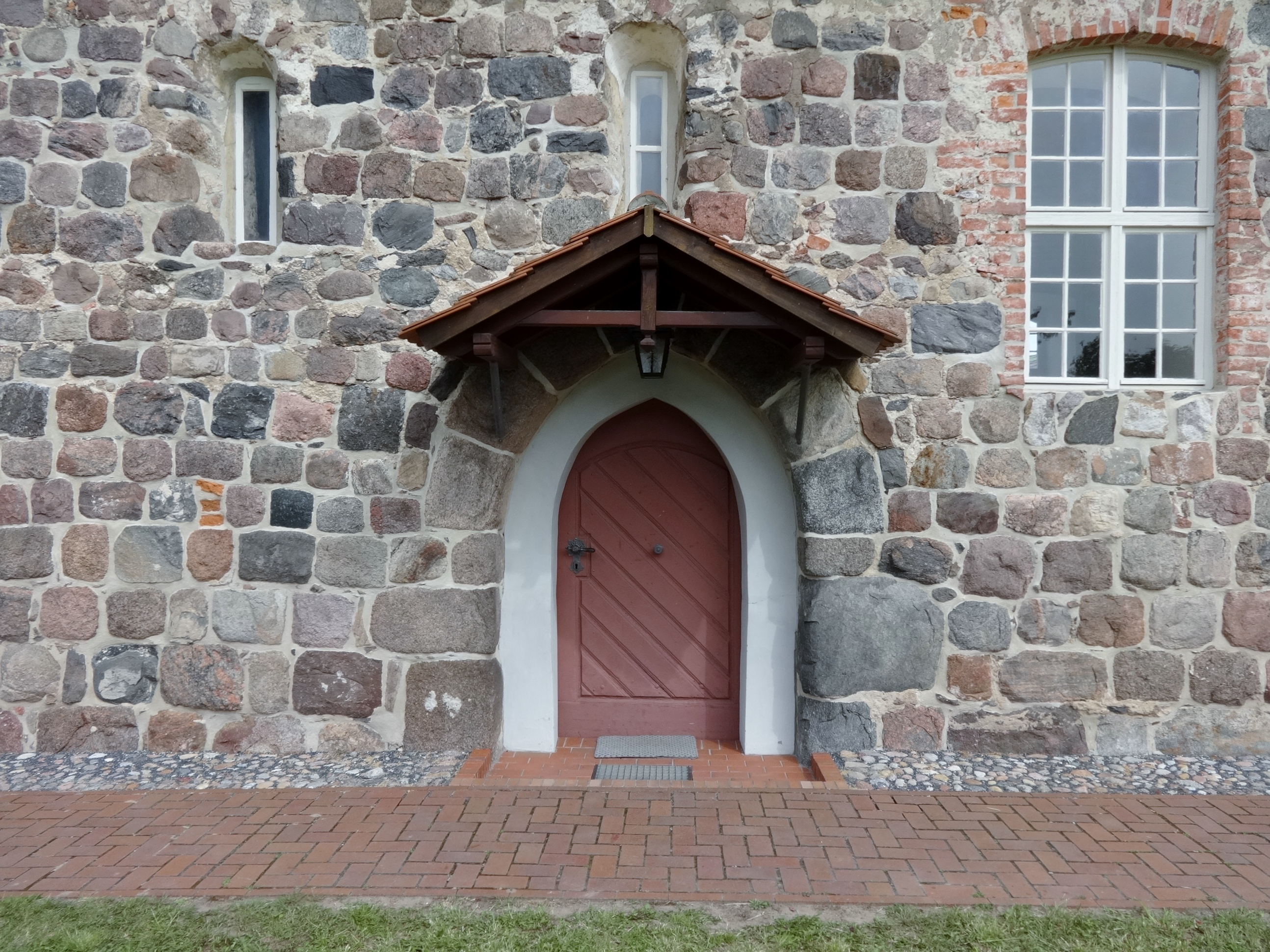 Die Dorfkirche Thyrow ist eine romanische Feldsteinkirche aus dem 13. Jahrhundert. Der mehrfach umgebaute Turm stammt aus dem Jahr 1794. Im Innern befinden sich eine barocke Empore sowie eine Dinse-Orgel aus dem Jahr 1908.